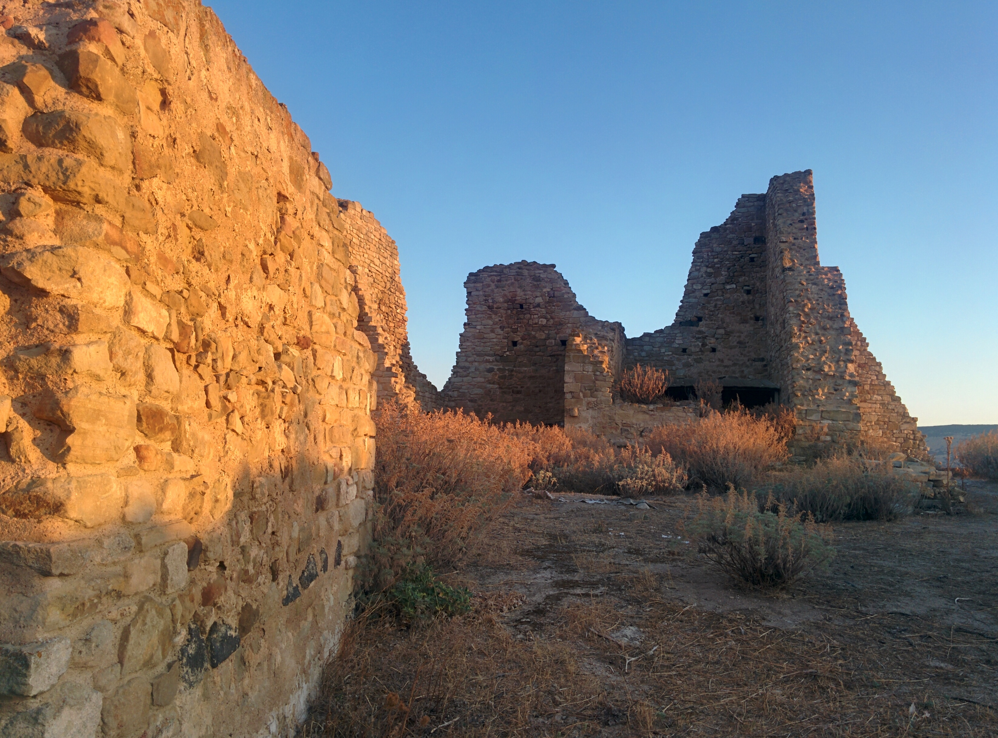 Dettaglio mura del castello di Las Plassas